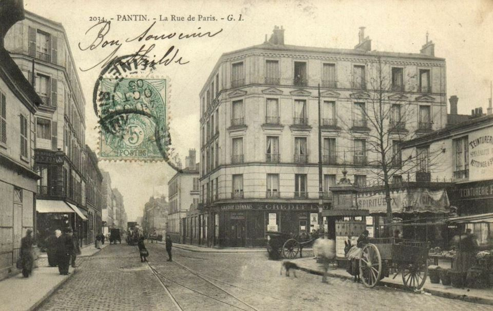 Pantin.Rue de Paris.Charette